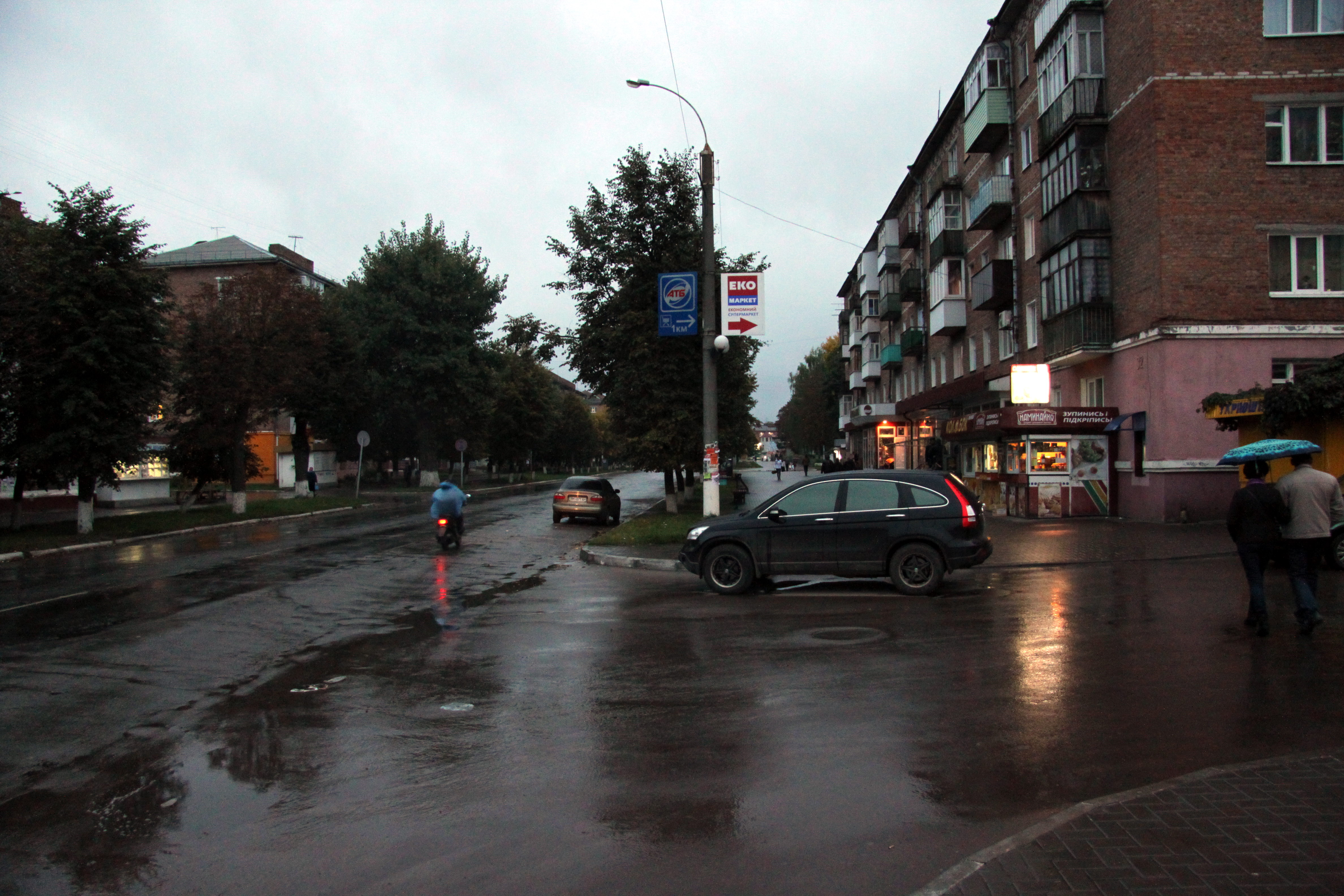 Житловий будинок, Шостка, вул. К. Маркса, 41